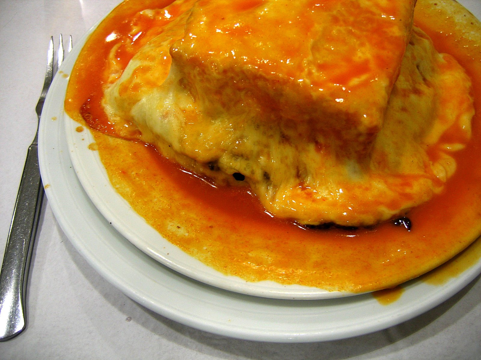 Francesinha, em Vila Nova de Gaia. Francesinha, a typical portuguese dish, in Vila Nova de Gaia.